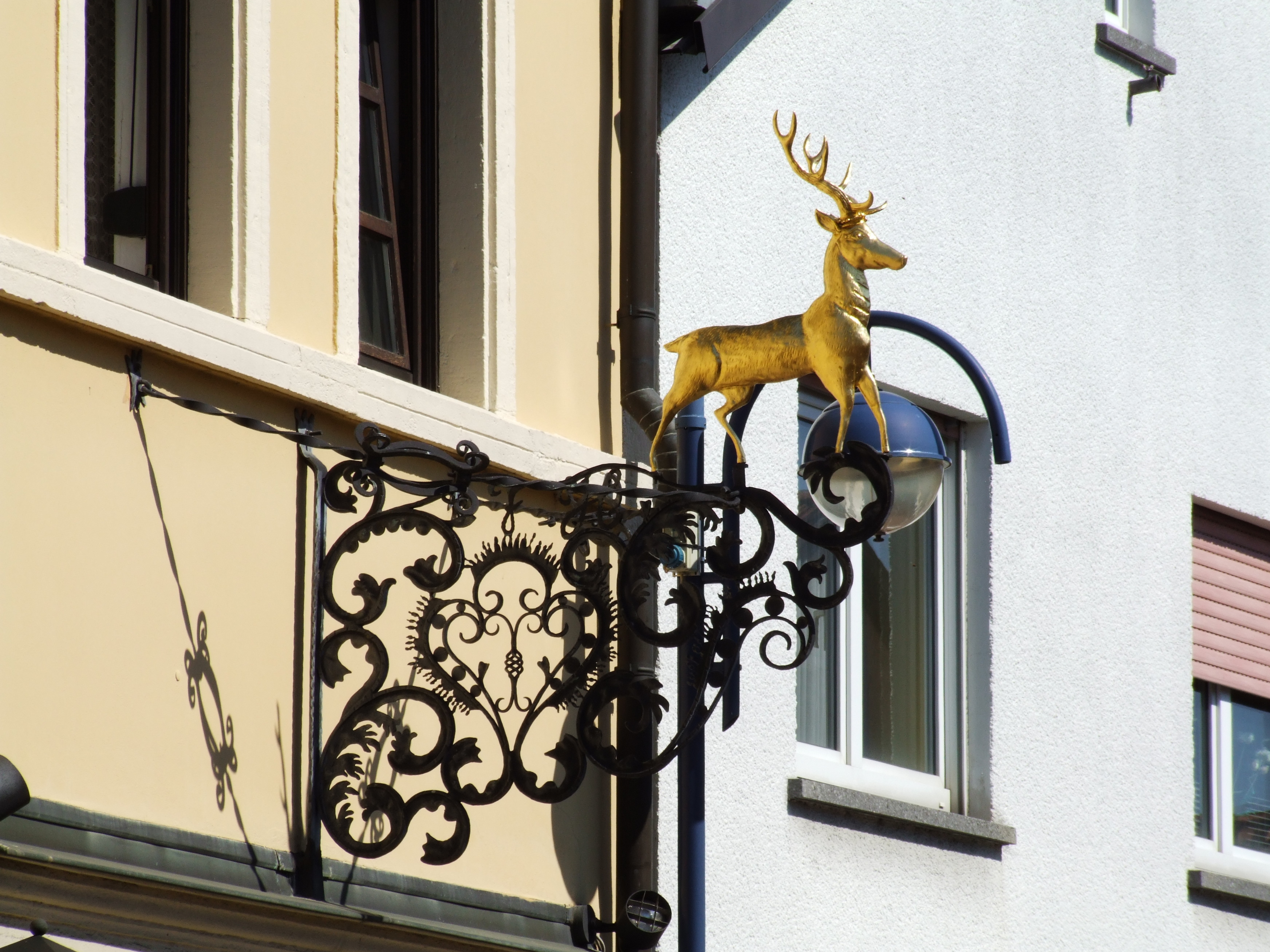 Nasenschild einer Gastwirtschaft, Zum Hirsch, Mingolsheim (Ortsteil von , im Kraichgau, Deutschland